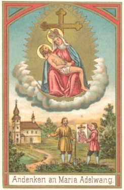 Gnadenbild von Adlwang, Österreich